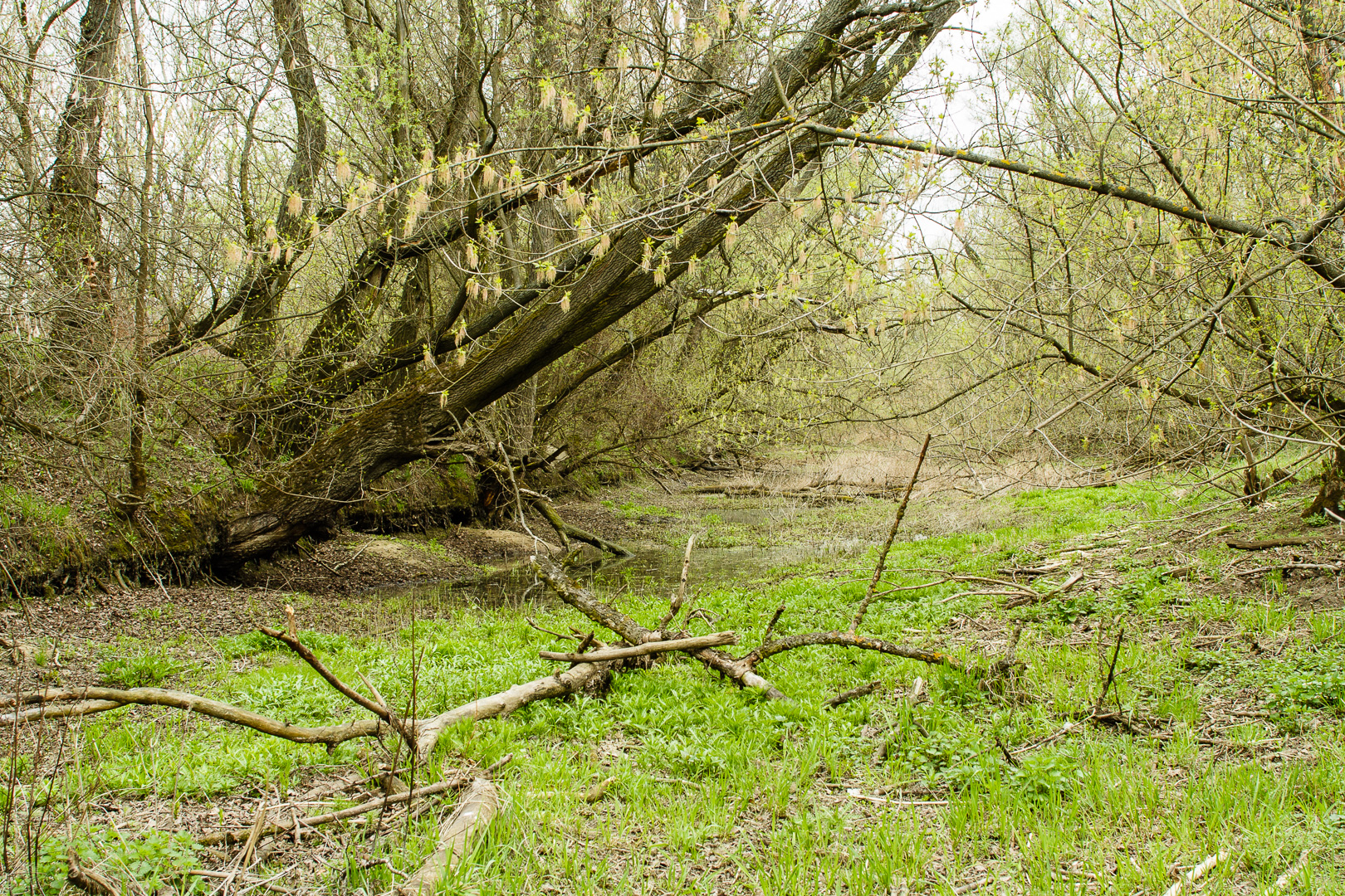 Stara Wisła. Na lewo Kępa Wieloryb. Wawer, Warszawa. This is a photography of Natura 2000 protected area with ID PLB140004